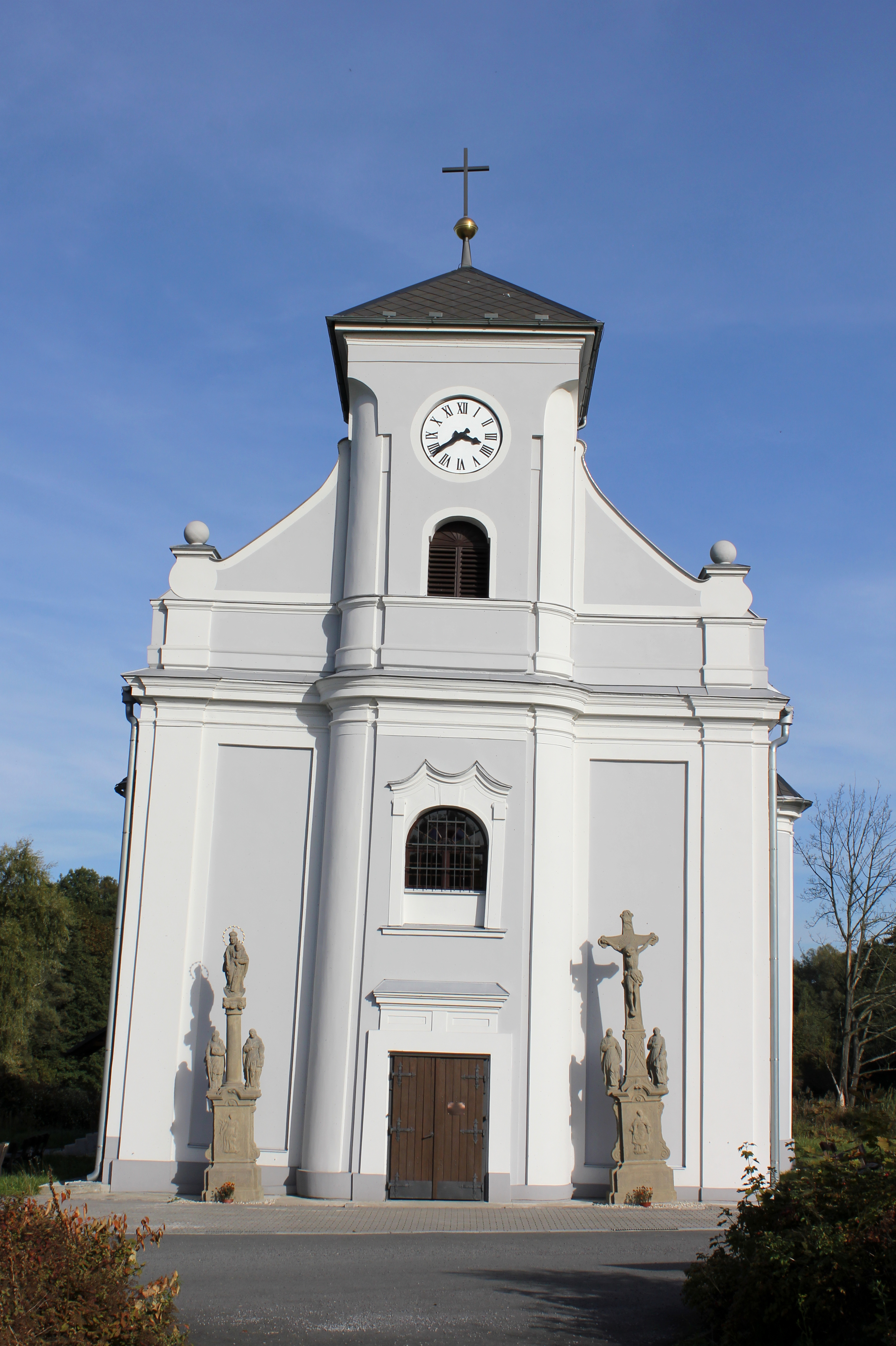 Kostel sv. Petra z Alkantary, Karviná-Doly.